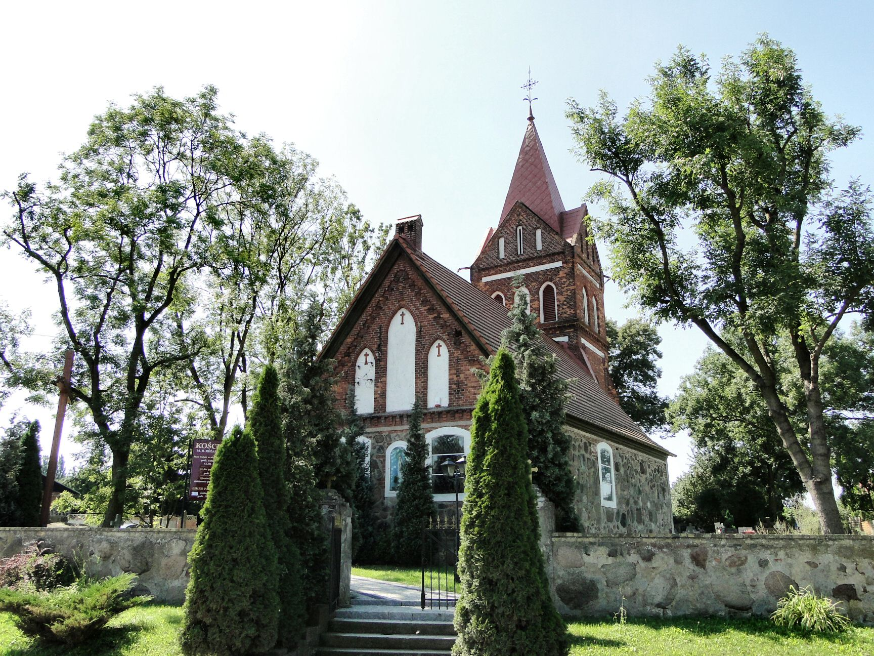 Bezrzecze (powiat policki) - kościół pw. Maryi Królowej Różańca Świętego